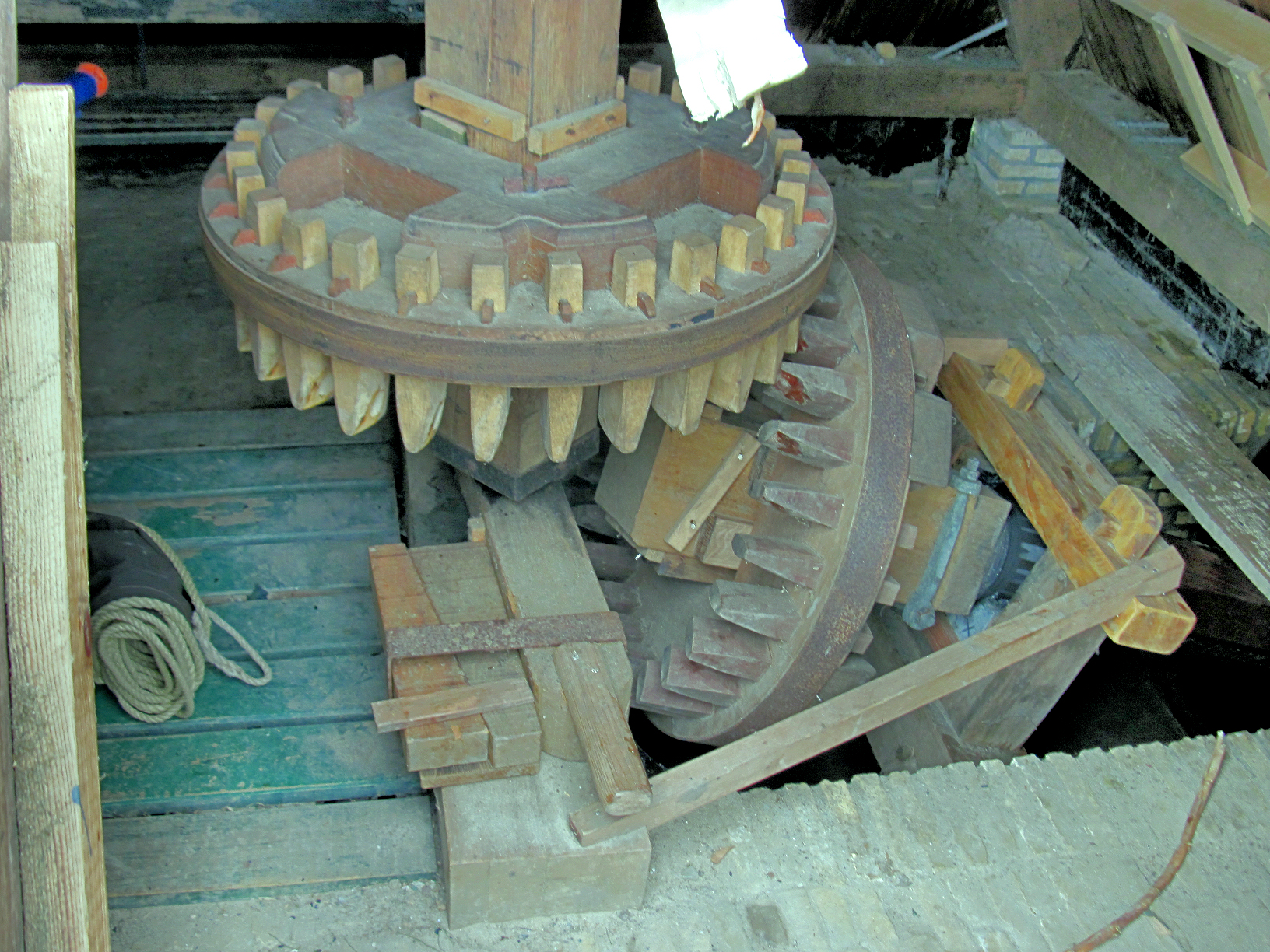 Molen Hoogland, Goutem, onderbonkelaar met vijzelwiel